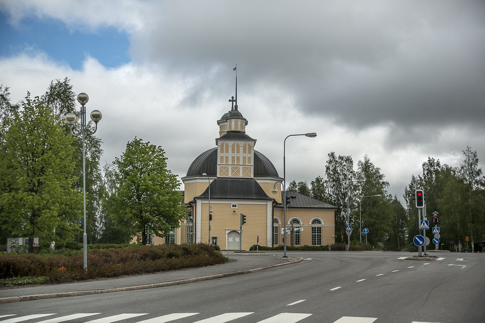 Kurikan kirkko.